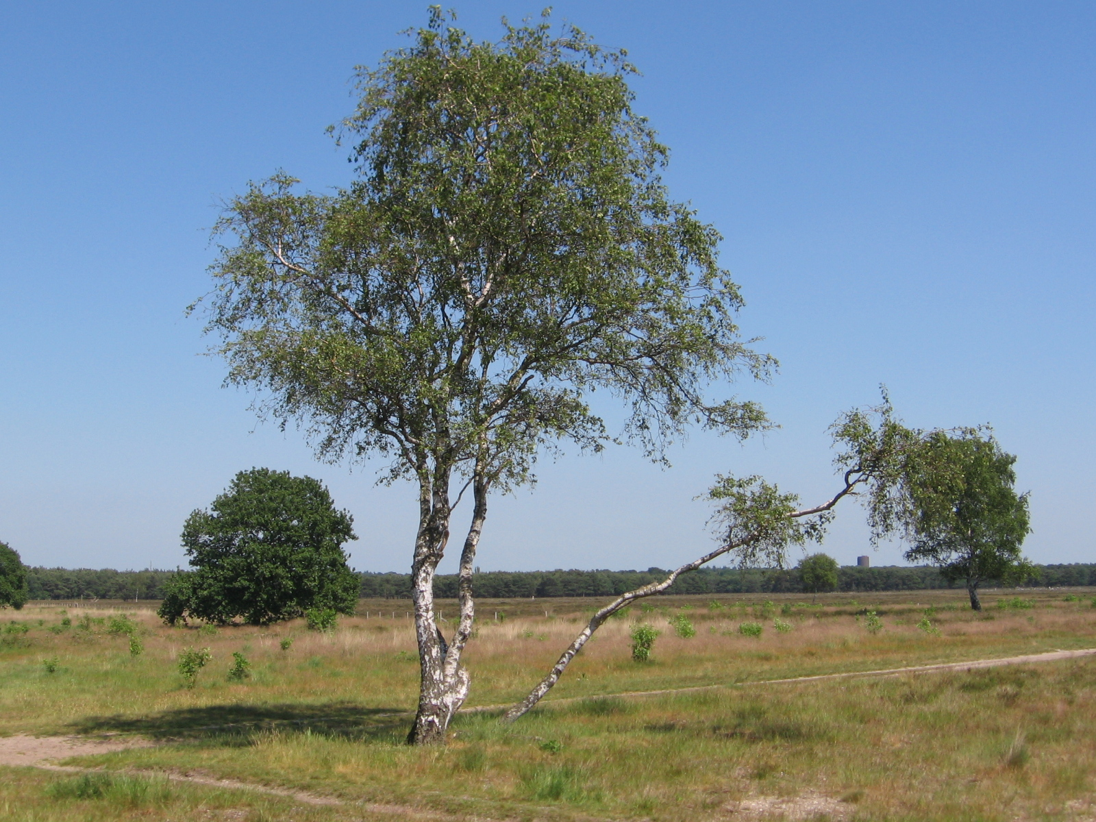 Bussum, Bussumerheide, juni 2006